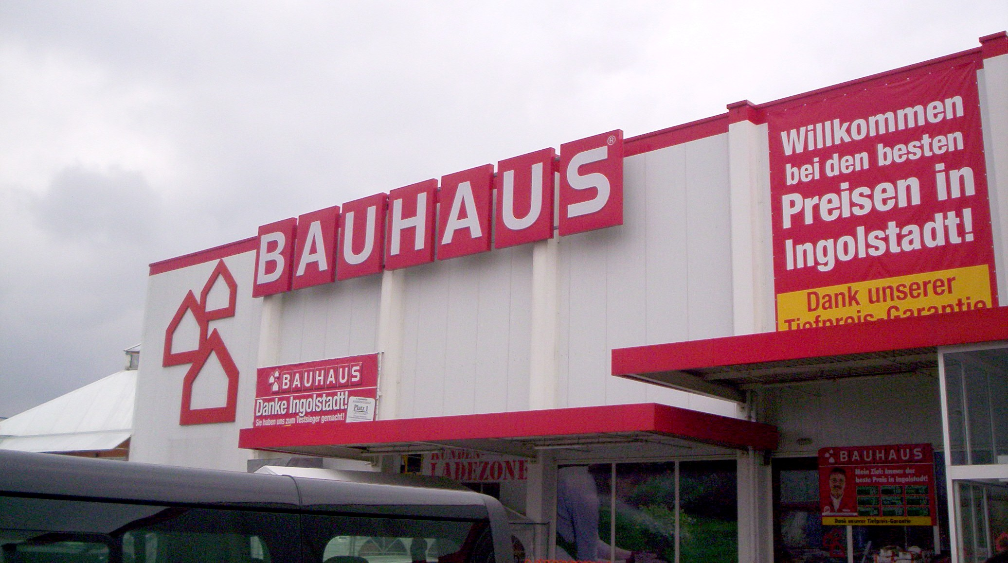 Bauhausfront in Ingolstadt